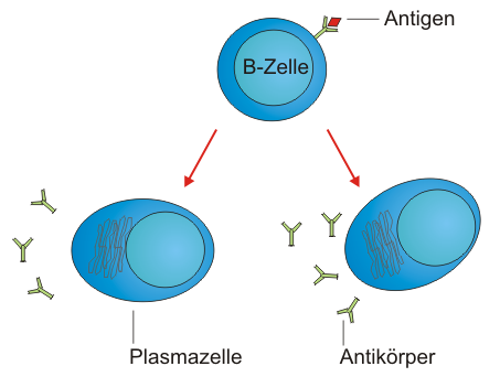 Eine B-Zelle wird zu Plasmazelle